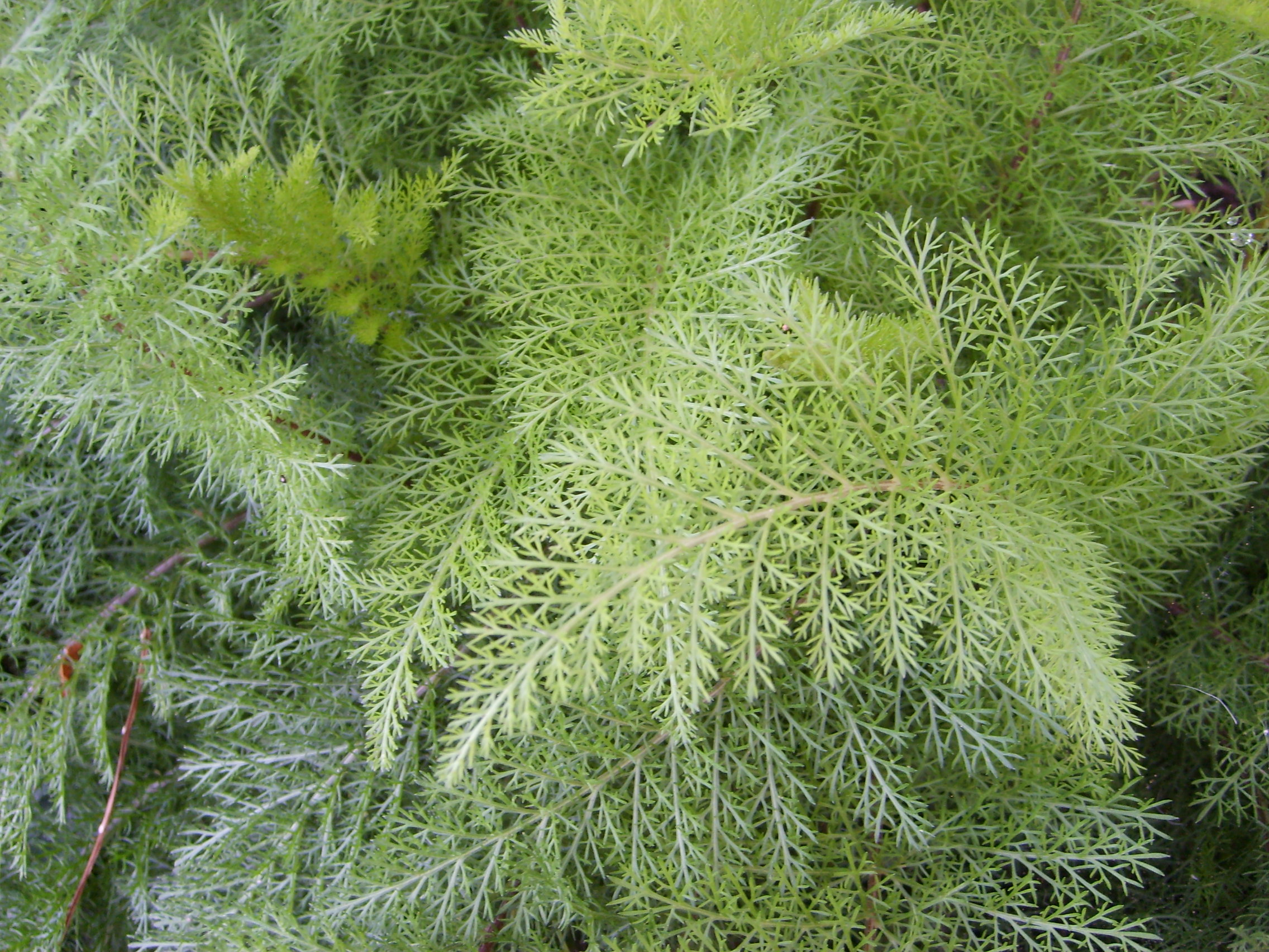 Fotografia digital realizada por Liber7